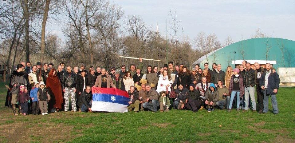 Српски (ћирилица): Родноверни скуп Старославаца 2013.